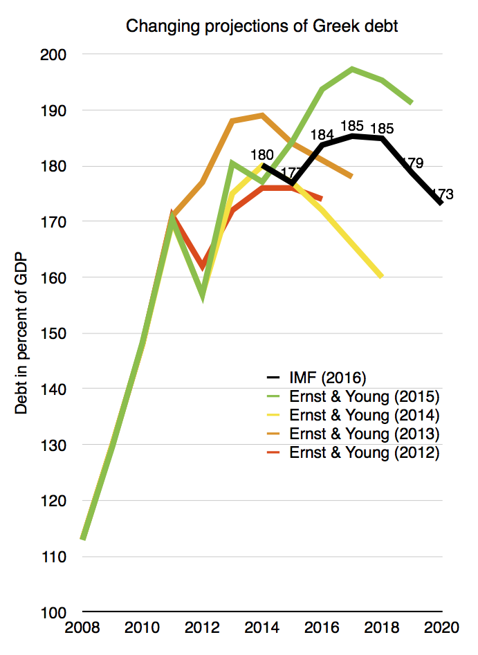 Projections of Greek governmental debt in percent of GDP (2008-2020)